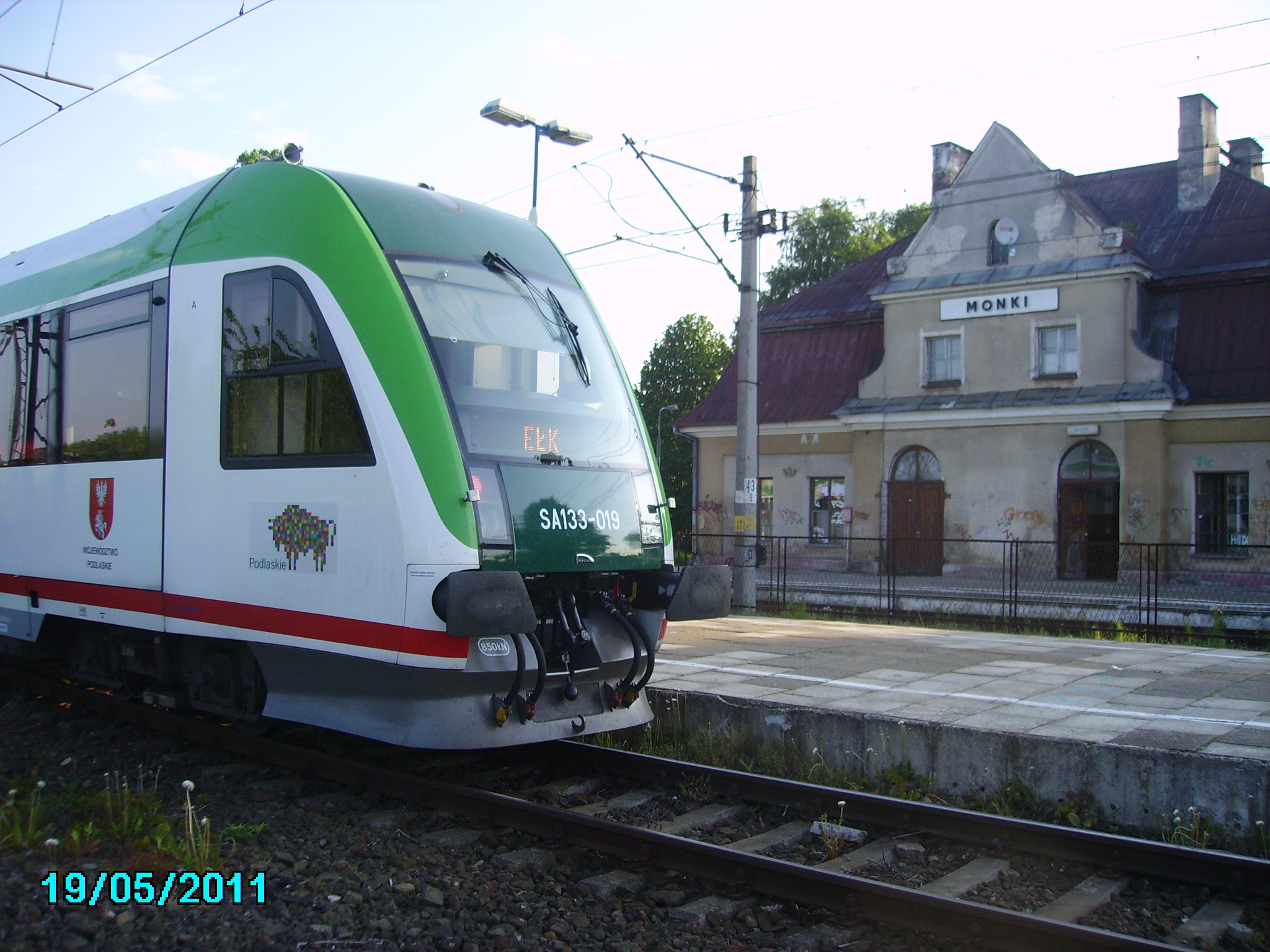 Otoczenie stacji kolejowej w Mońkach. Szynobus SA133-019.